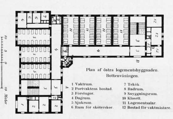 Plan för Östra logementet vid Stockholms stads arbetsinrättning vid Maria Bangata. Senare Vårdhemmet Högalid